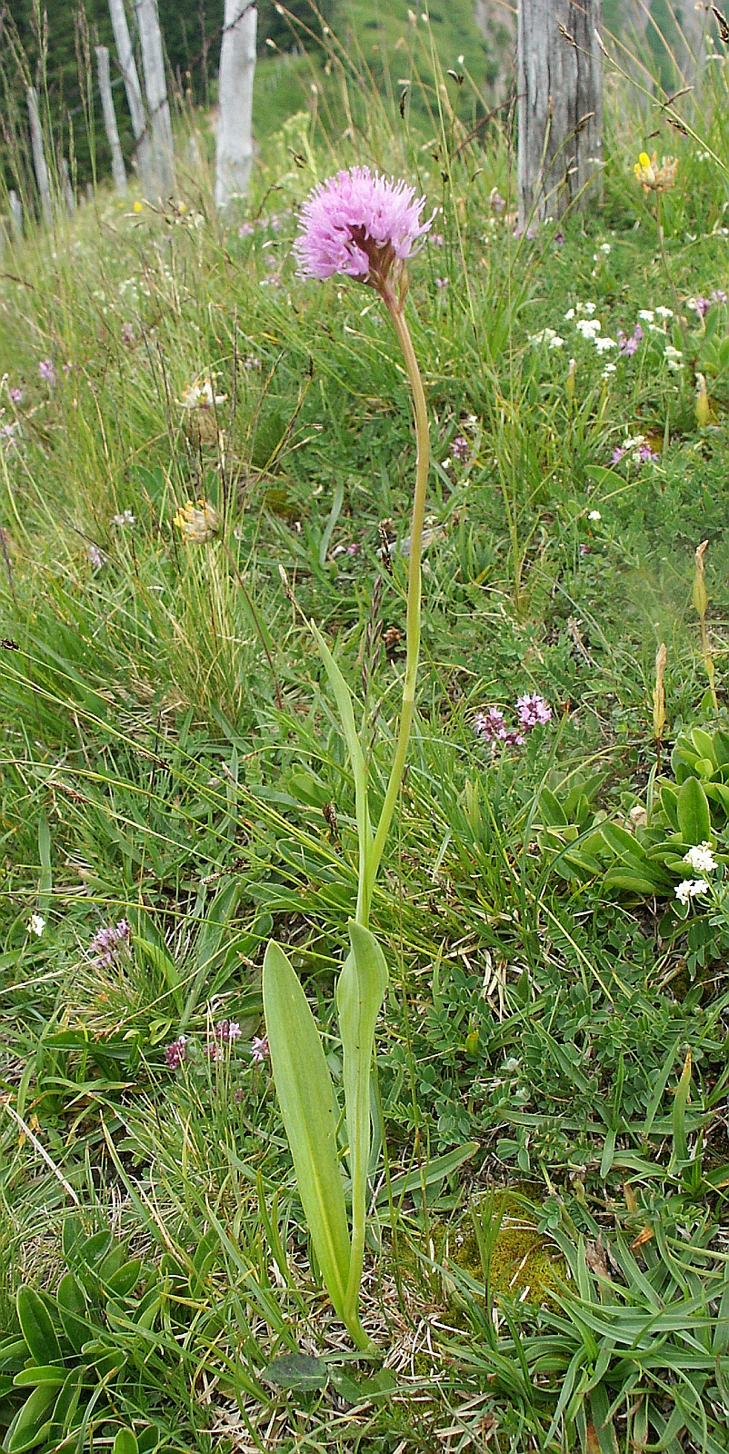 Traunsteinera globosa, Allgäuer Alpen, Germany